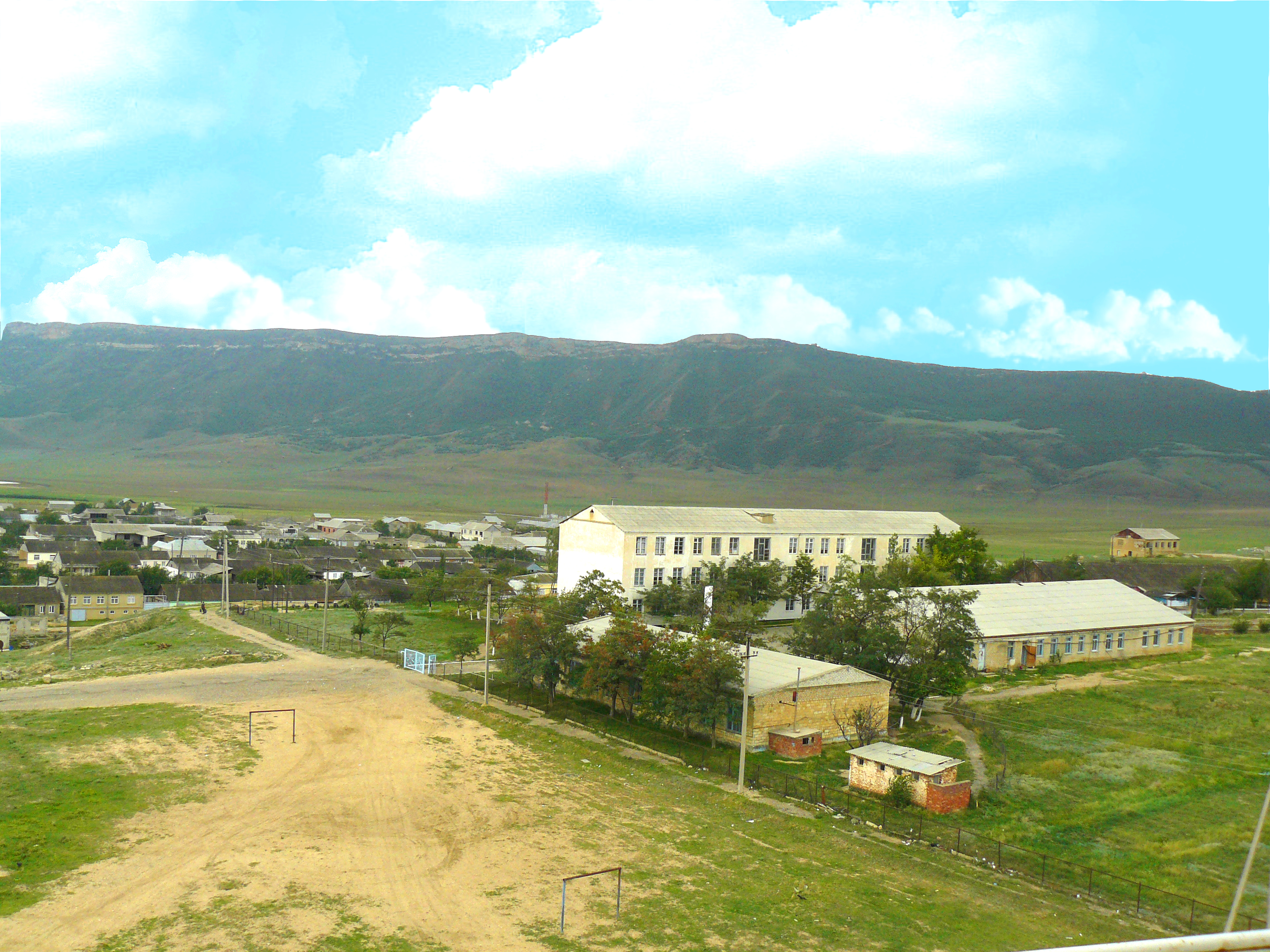 Вид на Новый Кумух (Исм.Альберт)